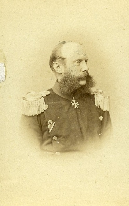 Rudolf Graf von Kanitz (1822-1902), preußischer Generalleutnant, Carte de visite aufgenommen von Heinrich Graf, Berlin um 1865.